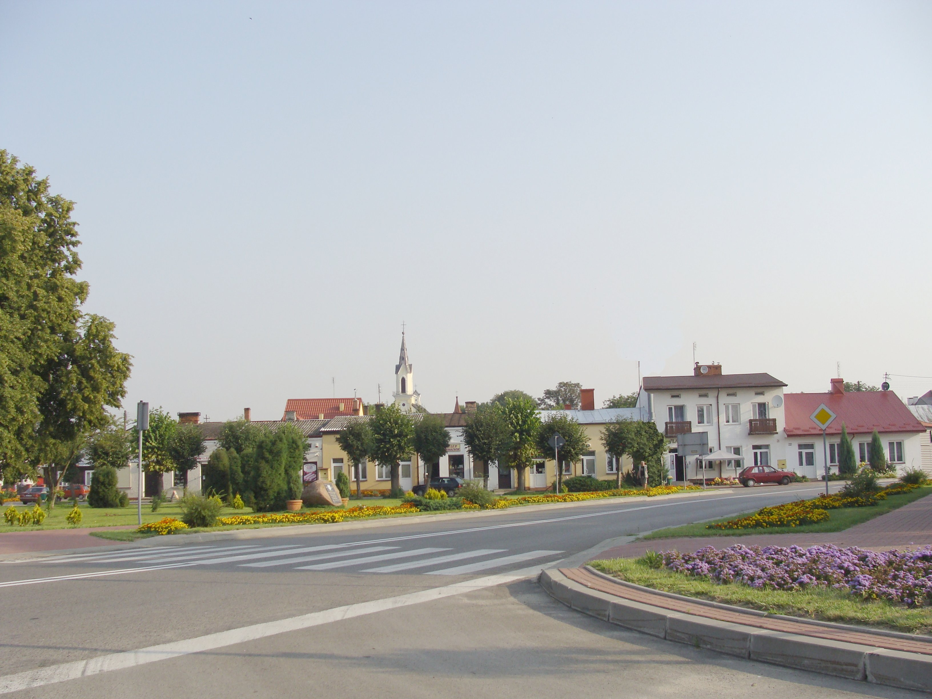 Frampol - kamieniczki w rynku